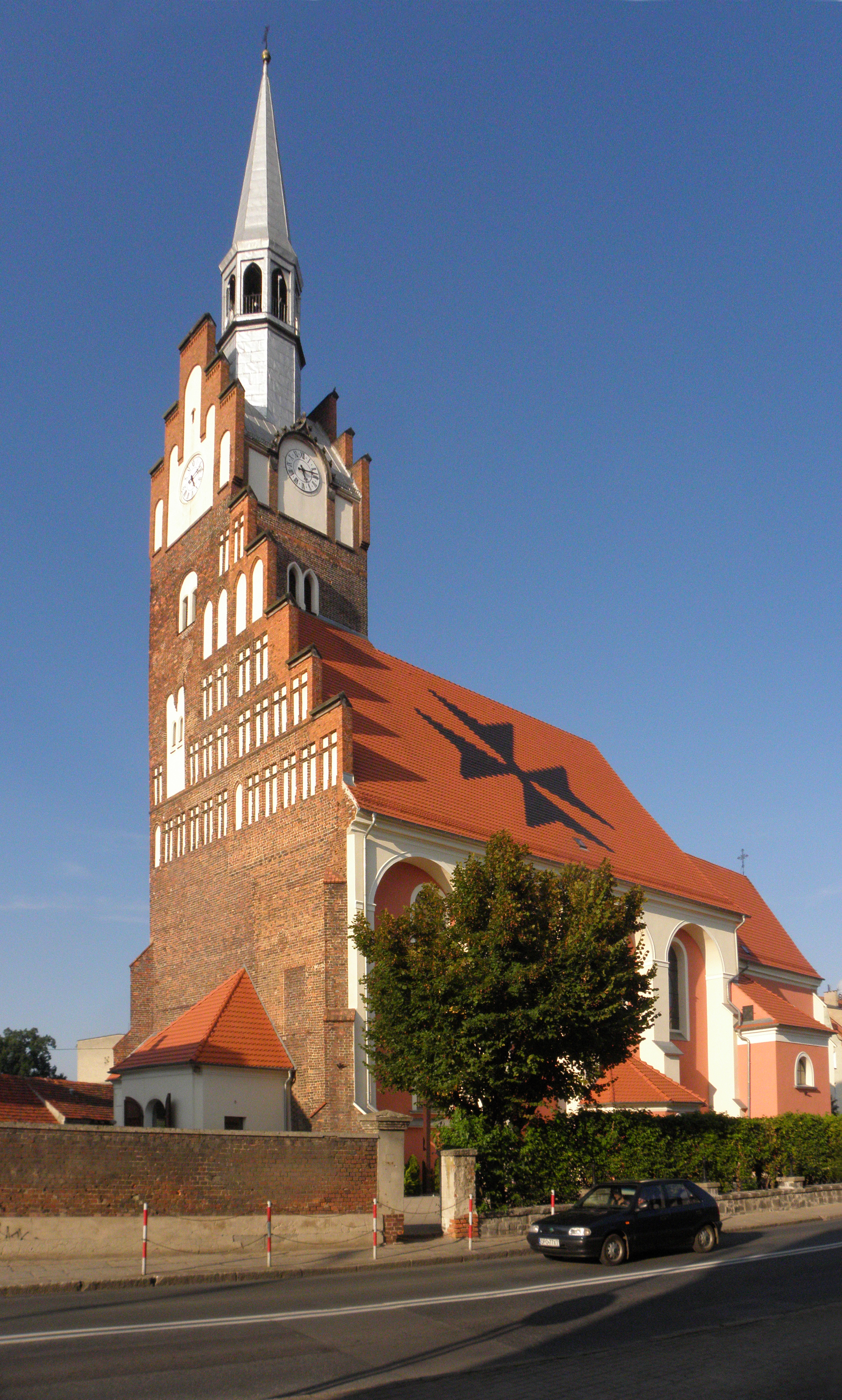 Niemodlin, kościół par. p.w. Wniebowzięcia NMP, pocz. XIV, 2 poł. XV, poł. XVII, 1 poł. XVIII, 1865